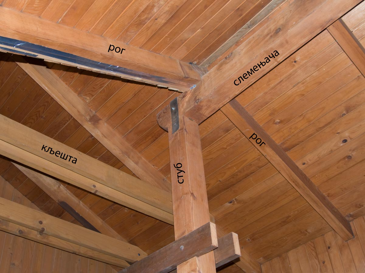 Делови кровне конструкције